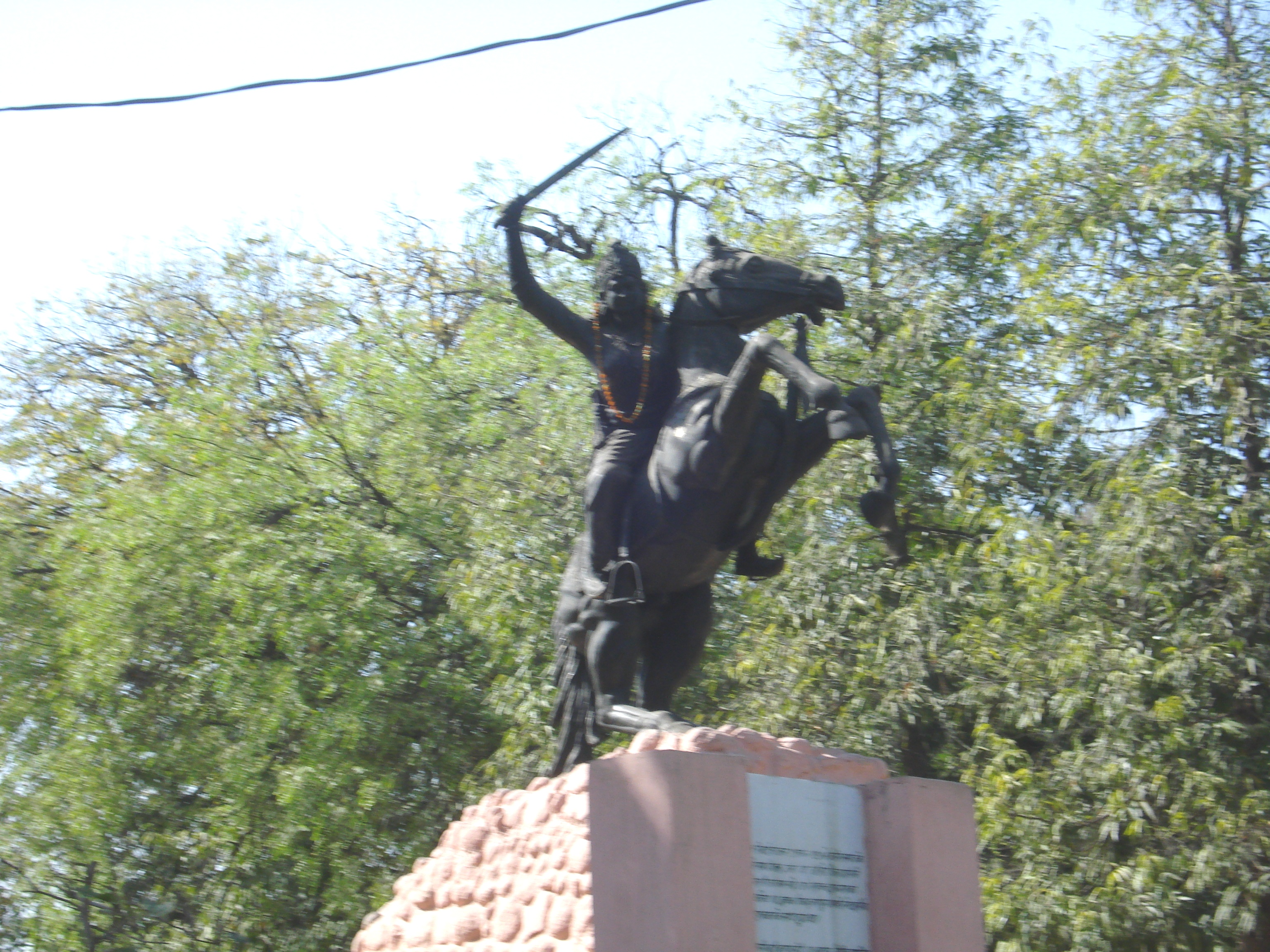 Jhalkari bai park near Akaswani Tiraha Gwalior